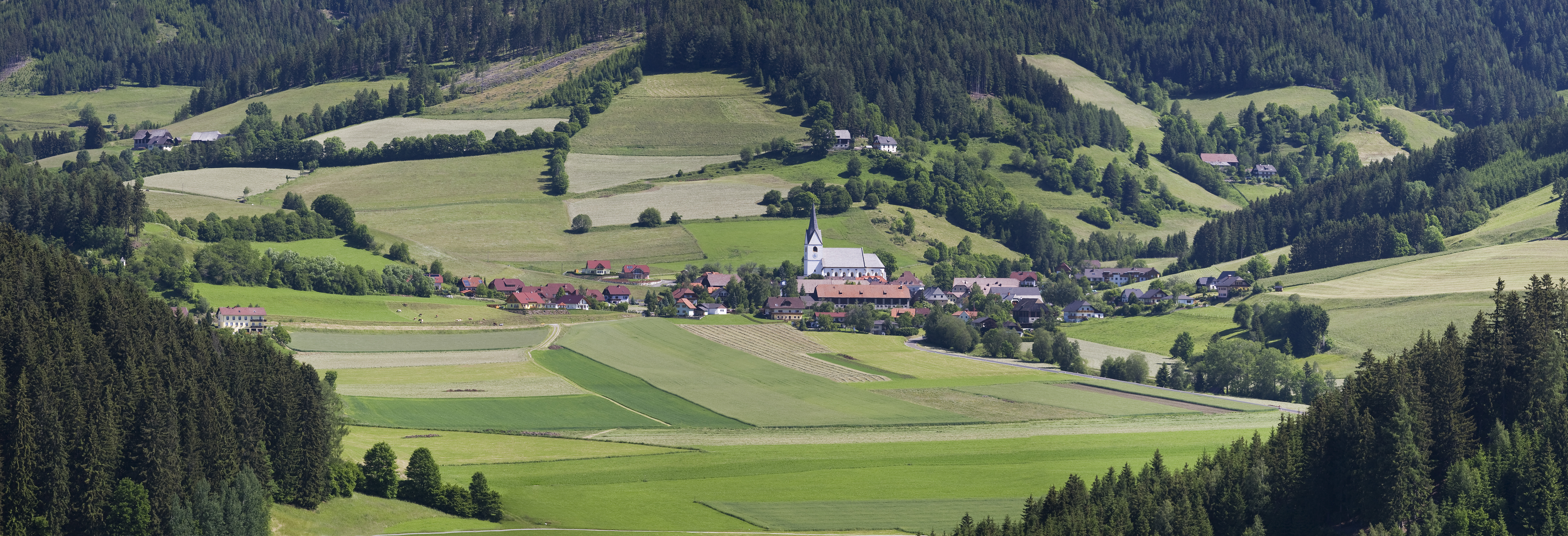 Blick auf Sankt Oswald-Möderbrugg. Das Bild zeigt den Ort von Südosten.